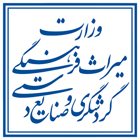 لوگوی جدید وزارتخانه میراث‌فرهنگی، گردشگری و صنایع‌دستی